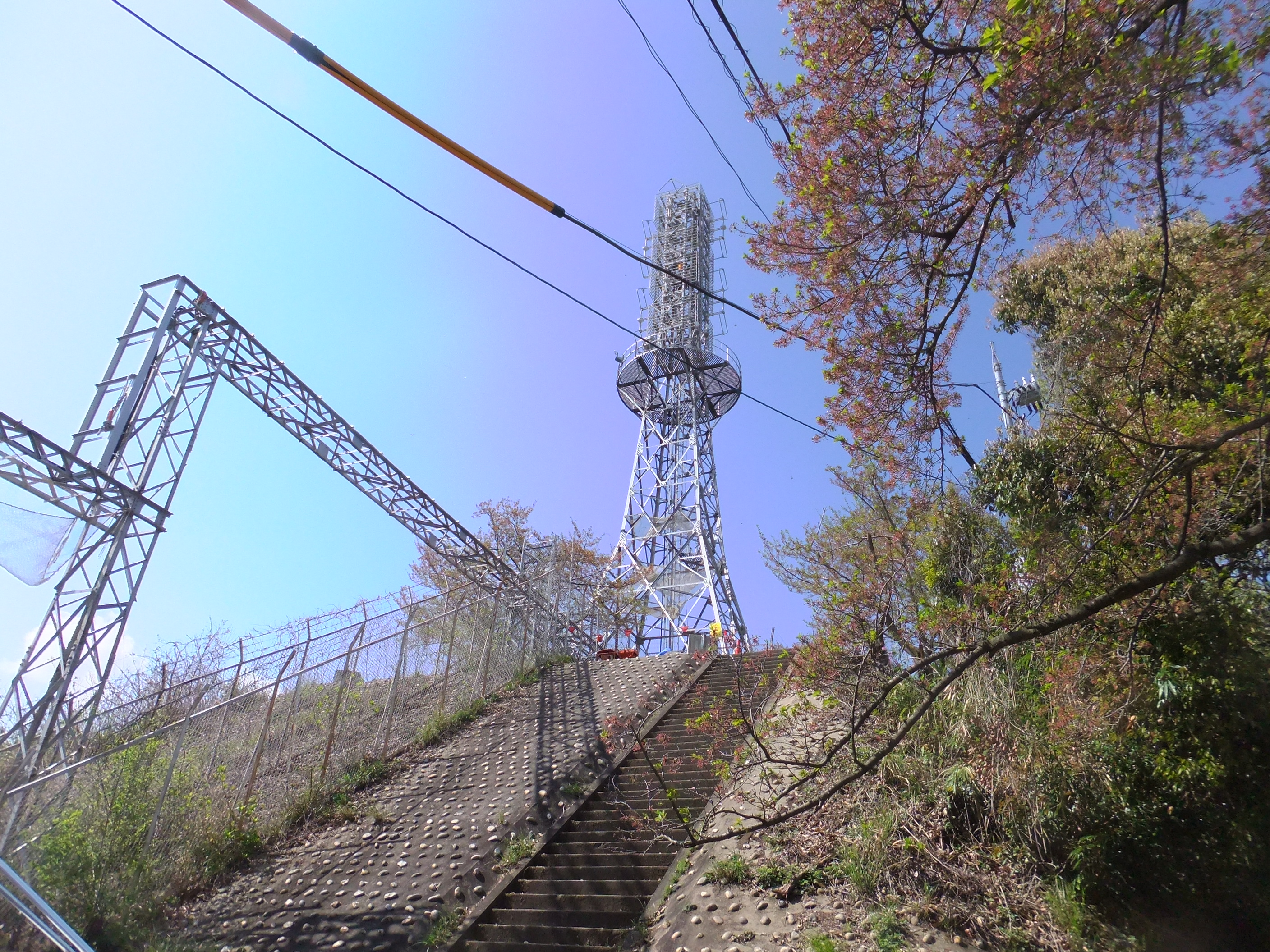 広島FM放送 黄金山送信所